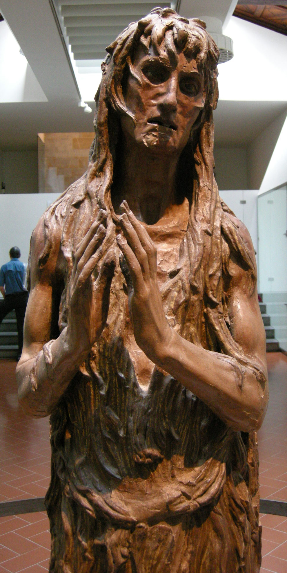 Donatello, maria maddalena